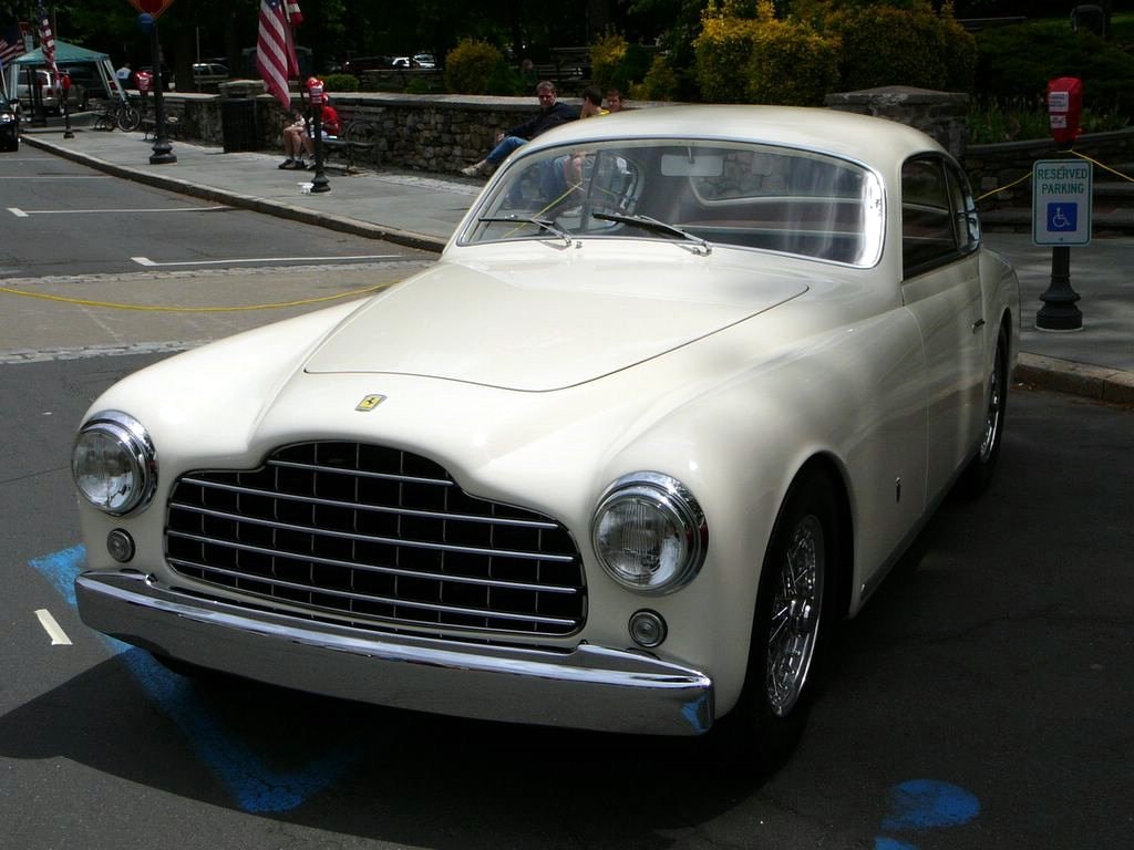 Ferrari 195 Inter Ghia Coupé del 1951 - 27 esemplari costruiti